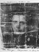 verschollenes Selbstportrait Peter Schwingens vor der Restaurierung, fotografiert von Julius Söhn